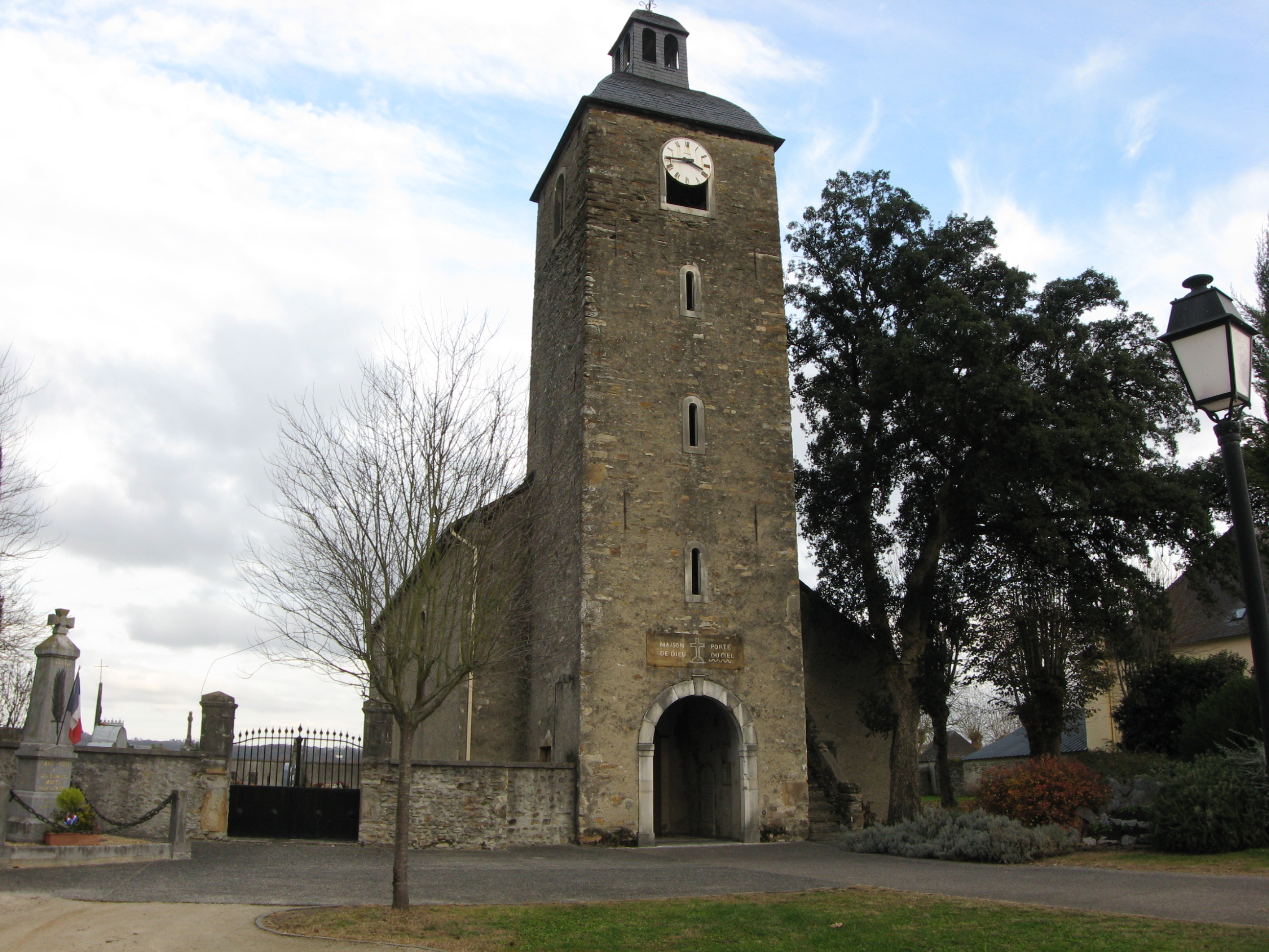 Eglise de Saint-Goin (Pyrénées-Atlantiques) (Pyrénées).